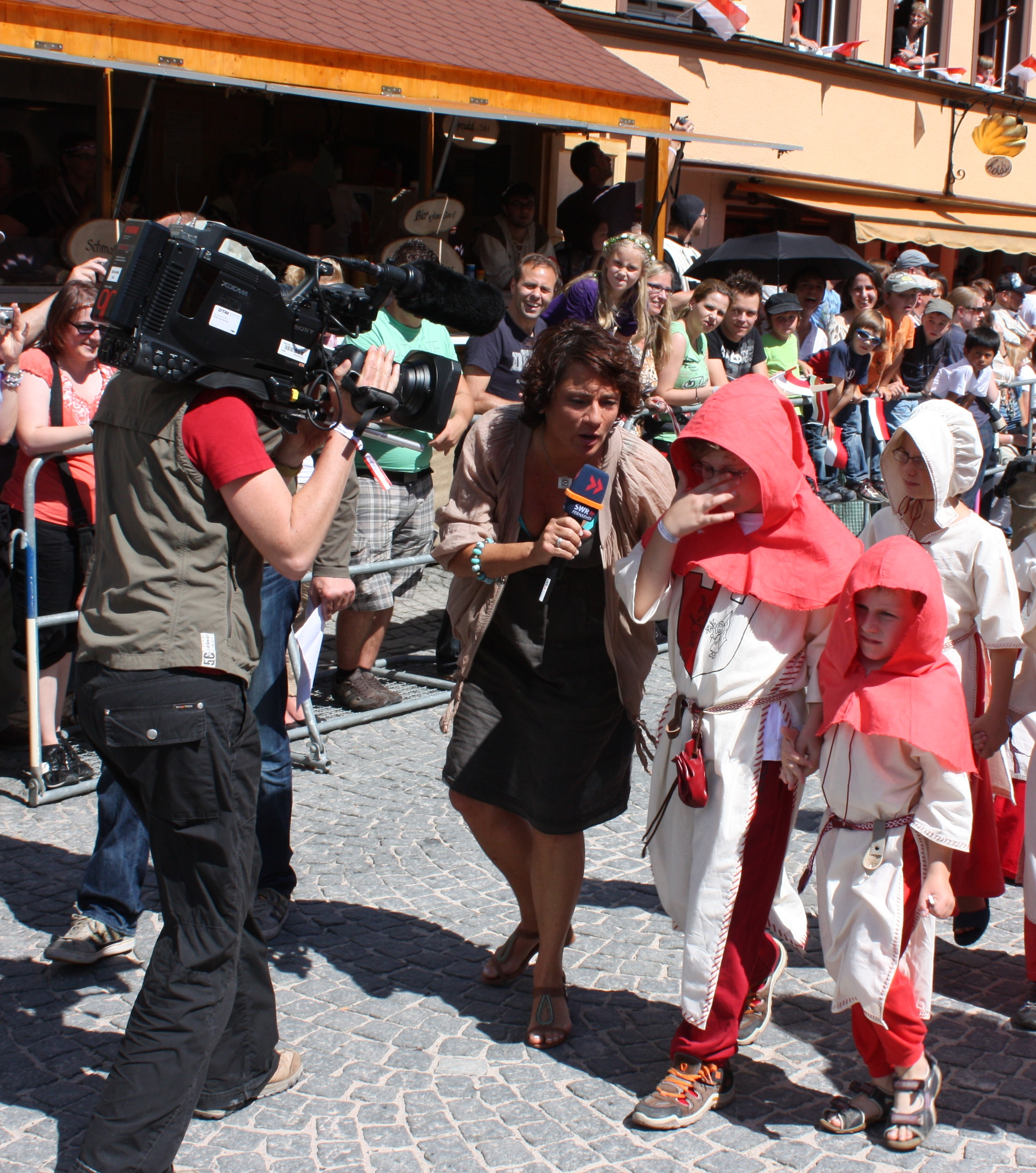 SWR-Fernsehmoderation Sonja Faber-Schrecklein mit Kameramann interviewt Kinder beim Stauferumzug in Schwäbisch Gmünd.